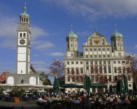 Augsburger Rathaus und Perlachturm. Das linke Gebäude ist der Perlachturm und das rechte das Augsburger Rathaus (erbaut de:1615 von Elias Holl).